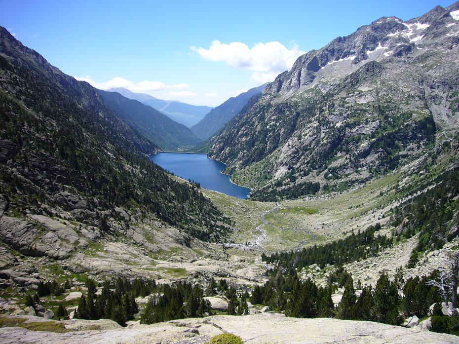 Embassament de Cavallers, vist des de l'extrem nord del Barranc de les Llastres; la Vall de Boí, Alta Ribagorça, Catalonia